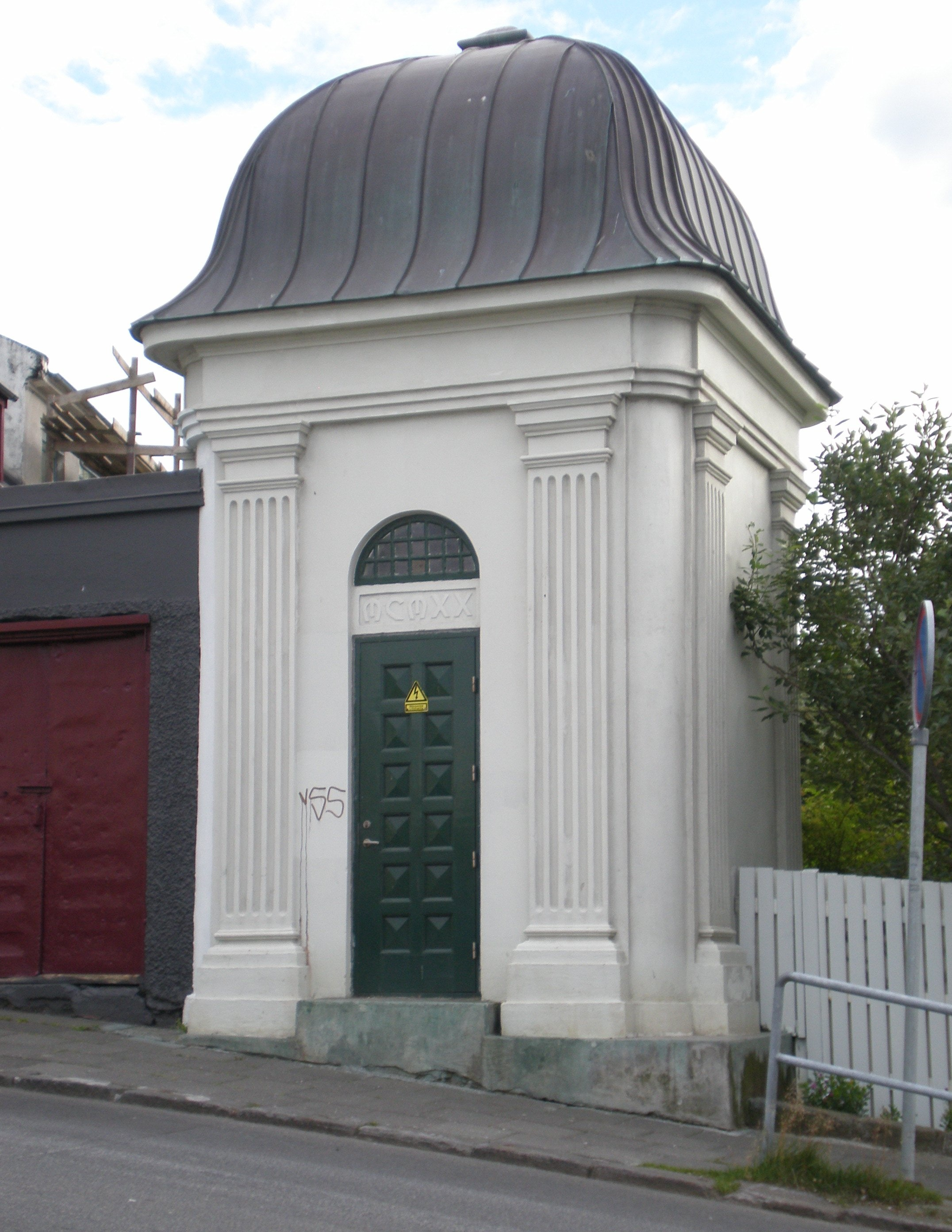 Spennistöð í Reykjavík nærri Menntaskólanum í Reykjavík. Örfá svona hús voru byggð, aðeins eitt þeirra hefur verið rifið. Mjög smekklegar byggingar, ólíkt flestum spennistöðvum.